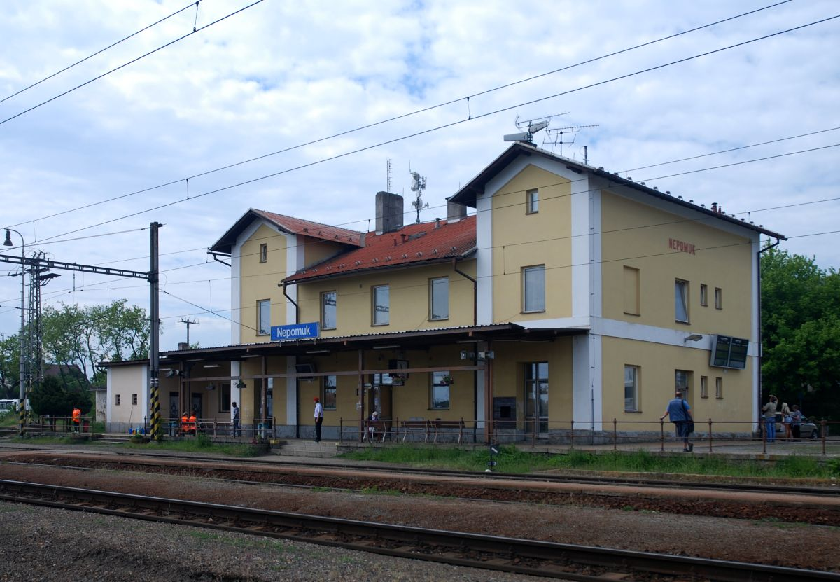 Nádraží Českých drah v Nepomuku